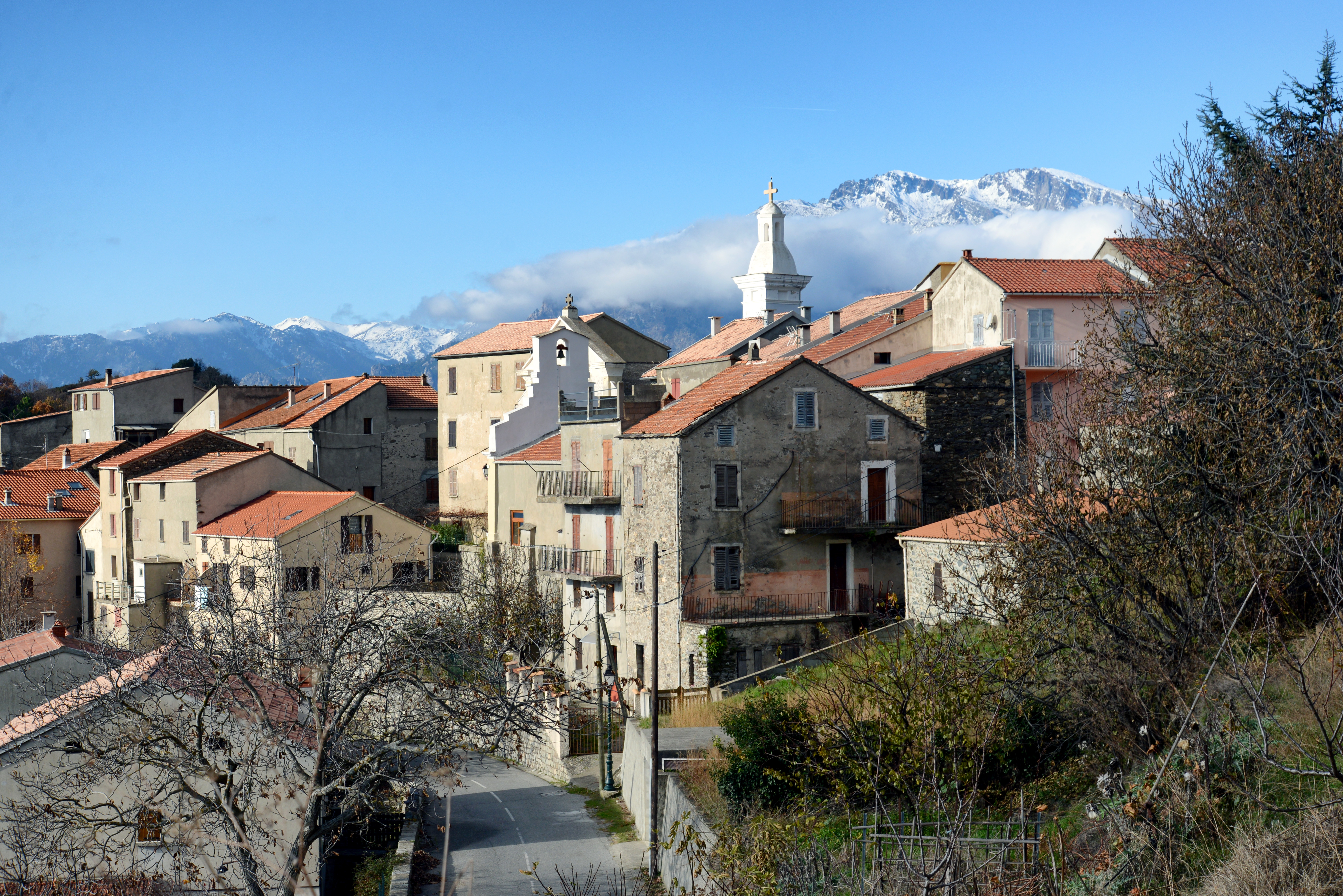 Altiani, Rogna (Corse) - Vue du village